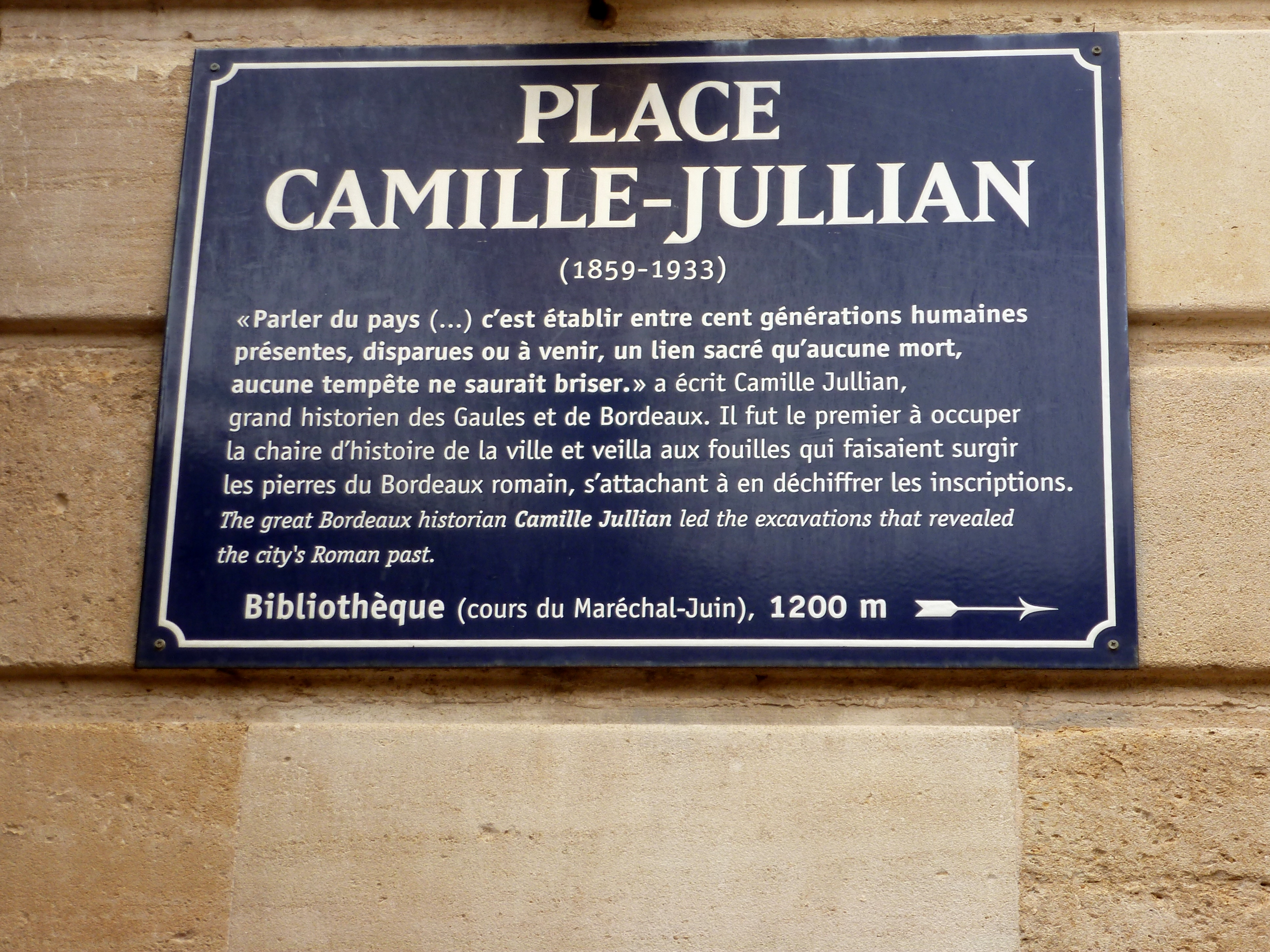 Plaque touristique, Place Camille Jullian à Bordeaux-33.